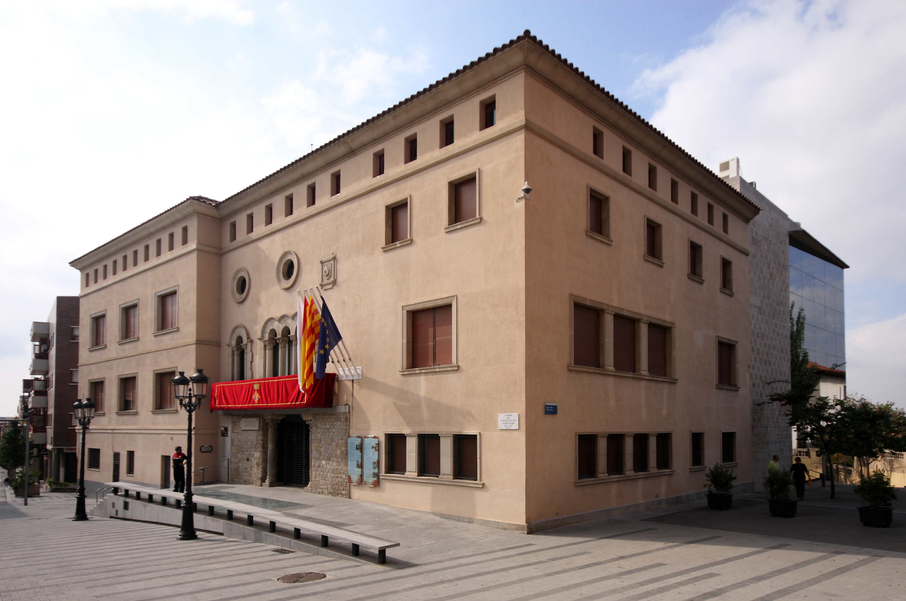 Ajuntament de la ciutat de Cornellà de Llobregat (vista lateral).